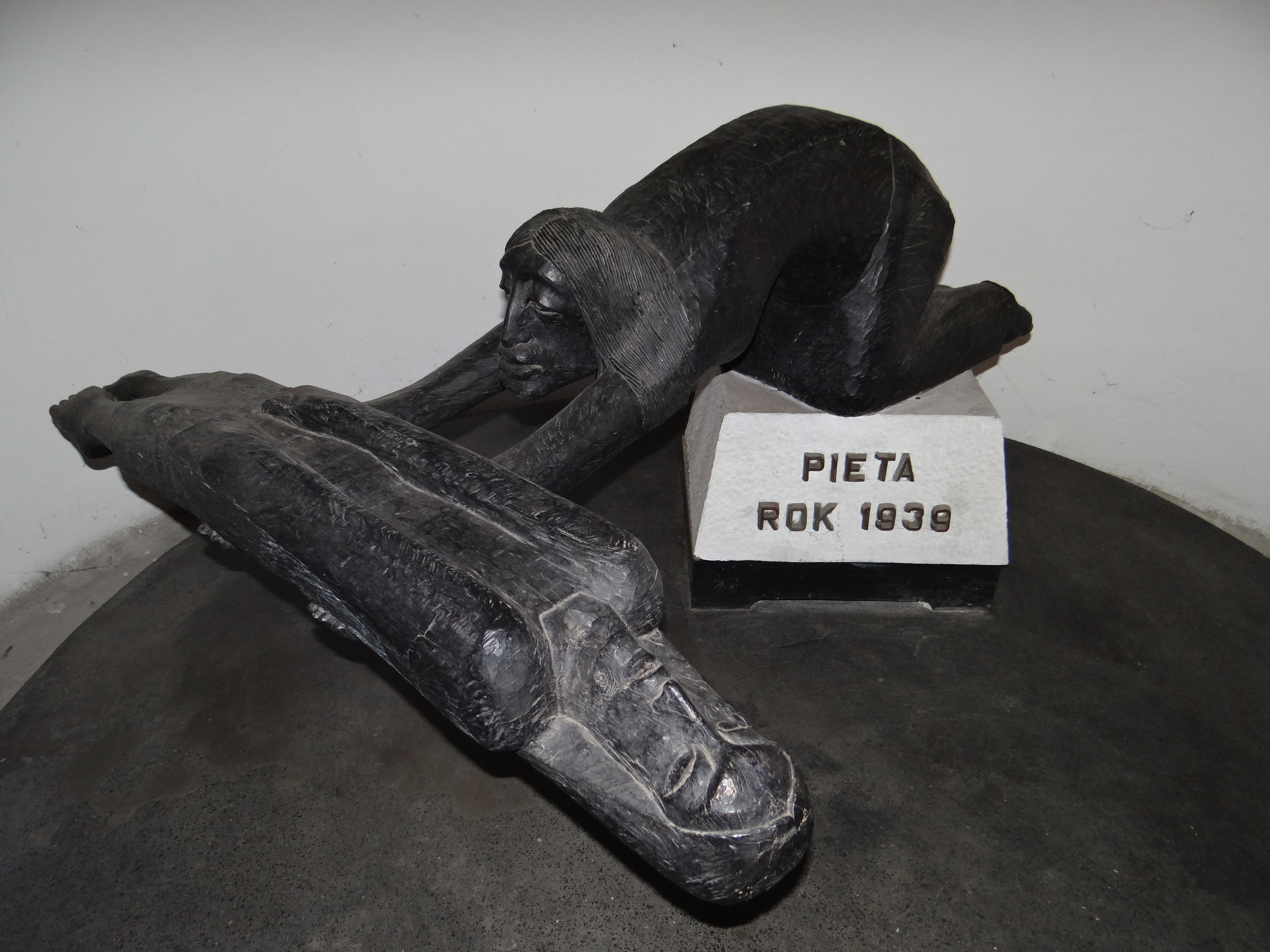 Kościół Matki Bożej Królowej Polski w Krakowie (Arka Pana). Pieta autor Antoni Rząsa.